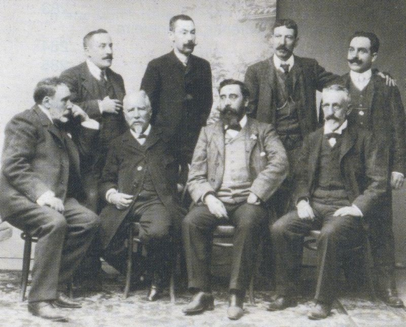 De pé, de esquerda a dereita, Uxío Carré Aldao, Florencio Vaamonde Lores, Francisco Tettamancy Gastón e Eladio Rodríguez González.Sentados, José Ojea, Manuel Murguía, Manuel Curros Enríquez e Andrés Martínez Salazar.